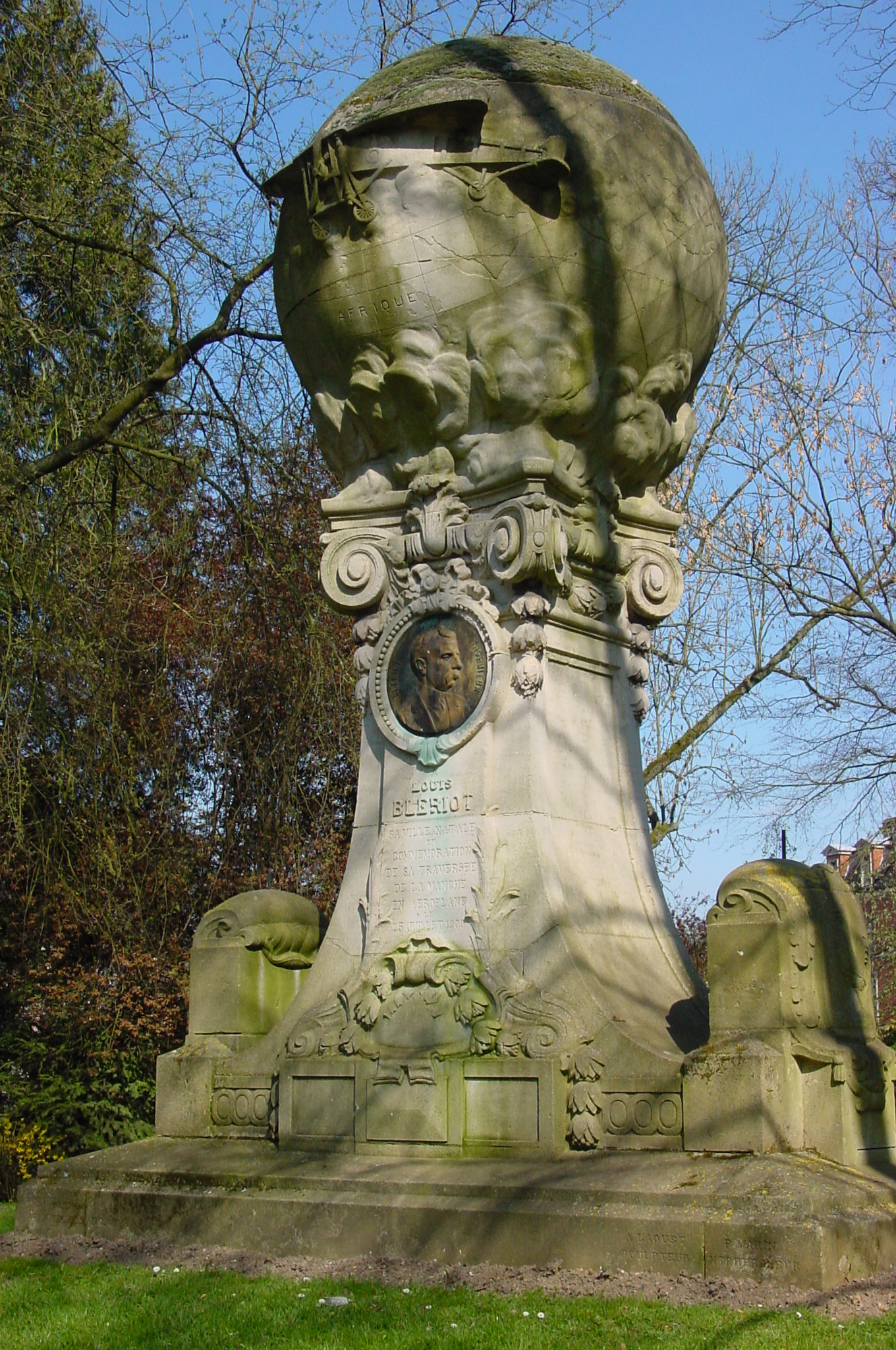 Monument à Louis Blériot, 1910, jardin aux fleurs de Cambrai, France. Sculpture en pierre par André-Louis-Adolphe Laoust, médaillone en bronze par Joseph Carlier, Laurent Fortier architecte.